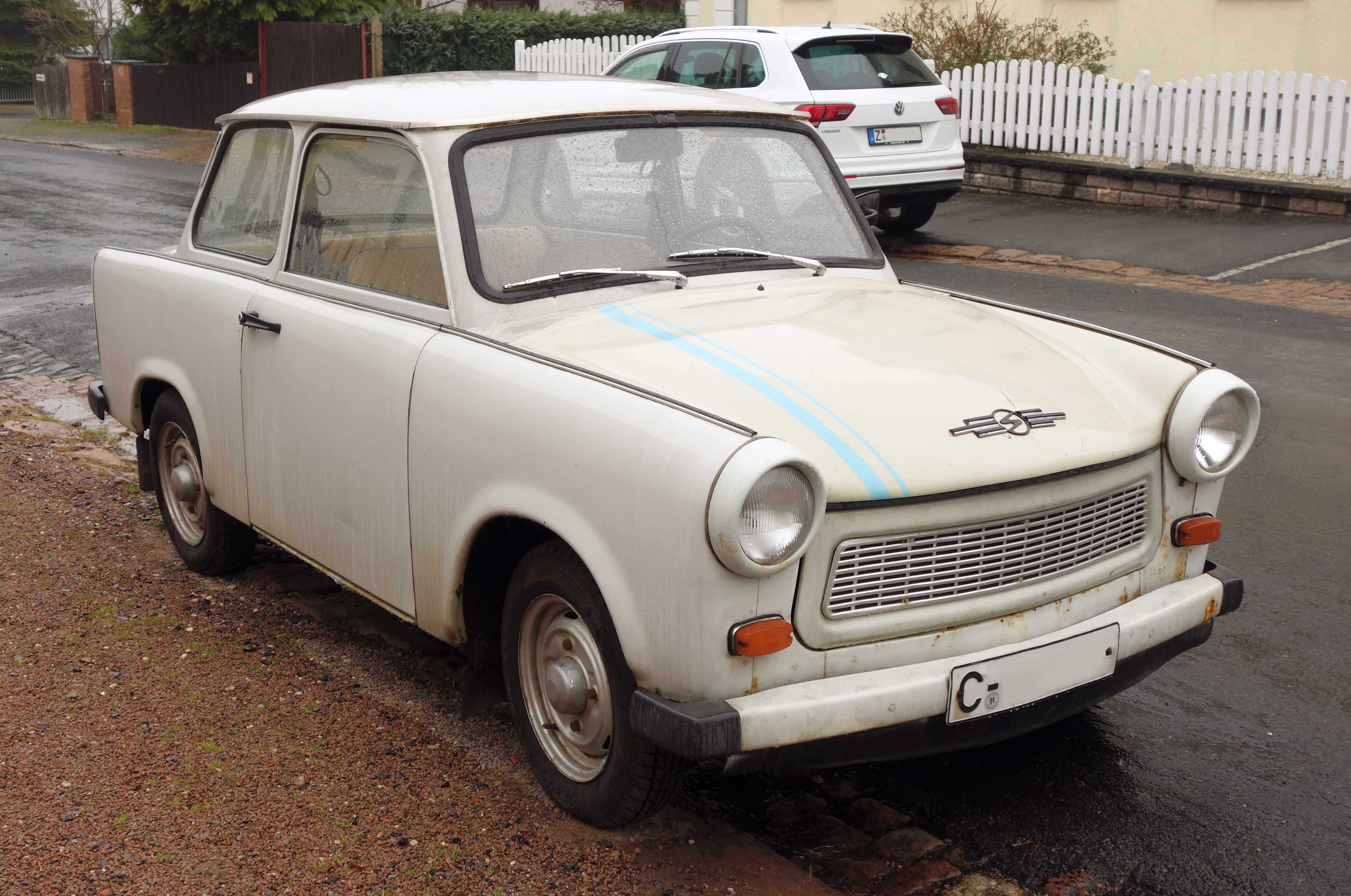 Auch dieser Trabant 601 ist noch im alltäglichen Einsatz und in Chemnitz zuhause. Aufnahme vom 14. April 2019